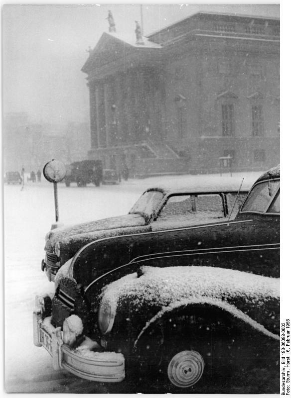 Berlin, Staatsoper, Winter Zentralbild Sturm 6.2.56 Schnee in Berlin Der von den Kindern und Wintersportlern, nicht aber von den Hauswarten, Kraftfahrern und der Strassenreinigung, erwartete Schnee ist eingetroffen und gab der Hauptstadt ein winterlich-anmutiges Aussehen. UBz: An der Deutschen Staatsoper Berlin.